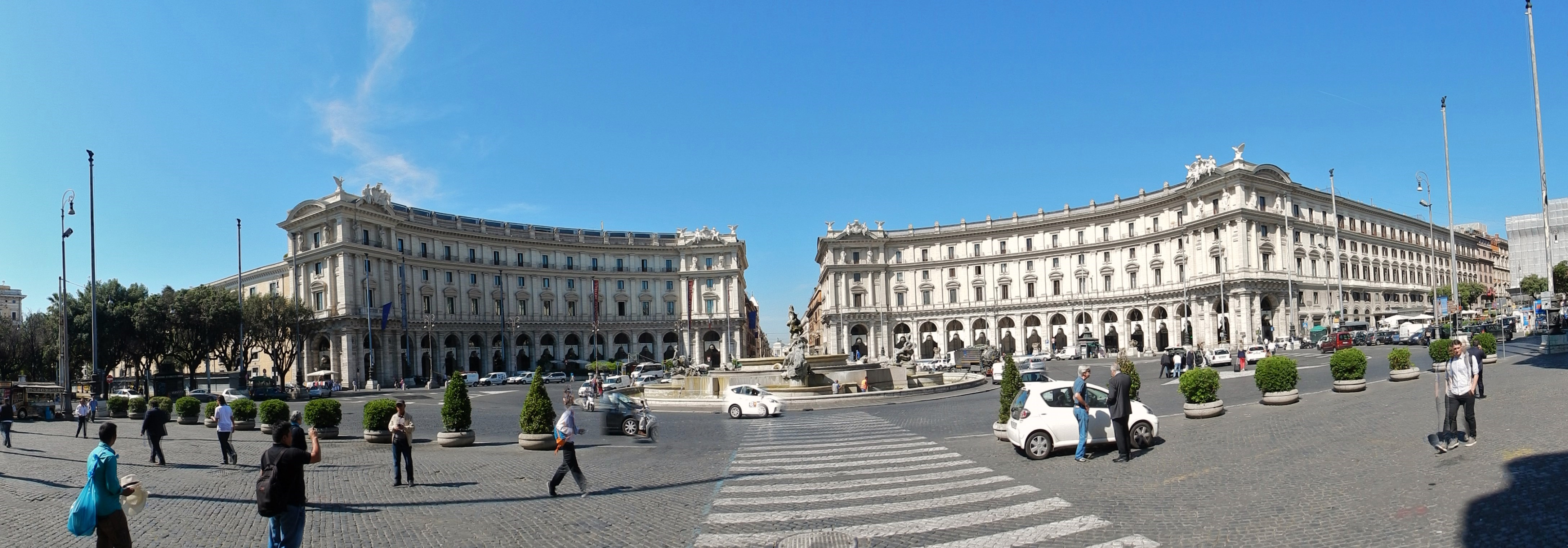 Fontana delle Naiadi This is a photo of a monument which is part of cultural heritage of Italy.